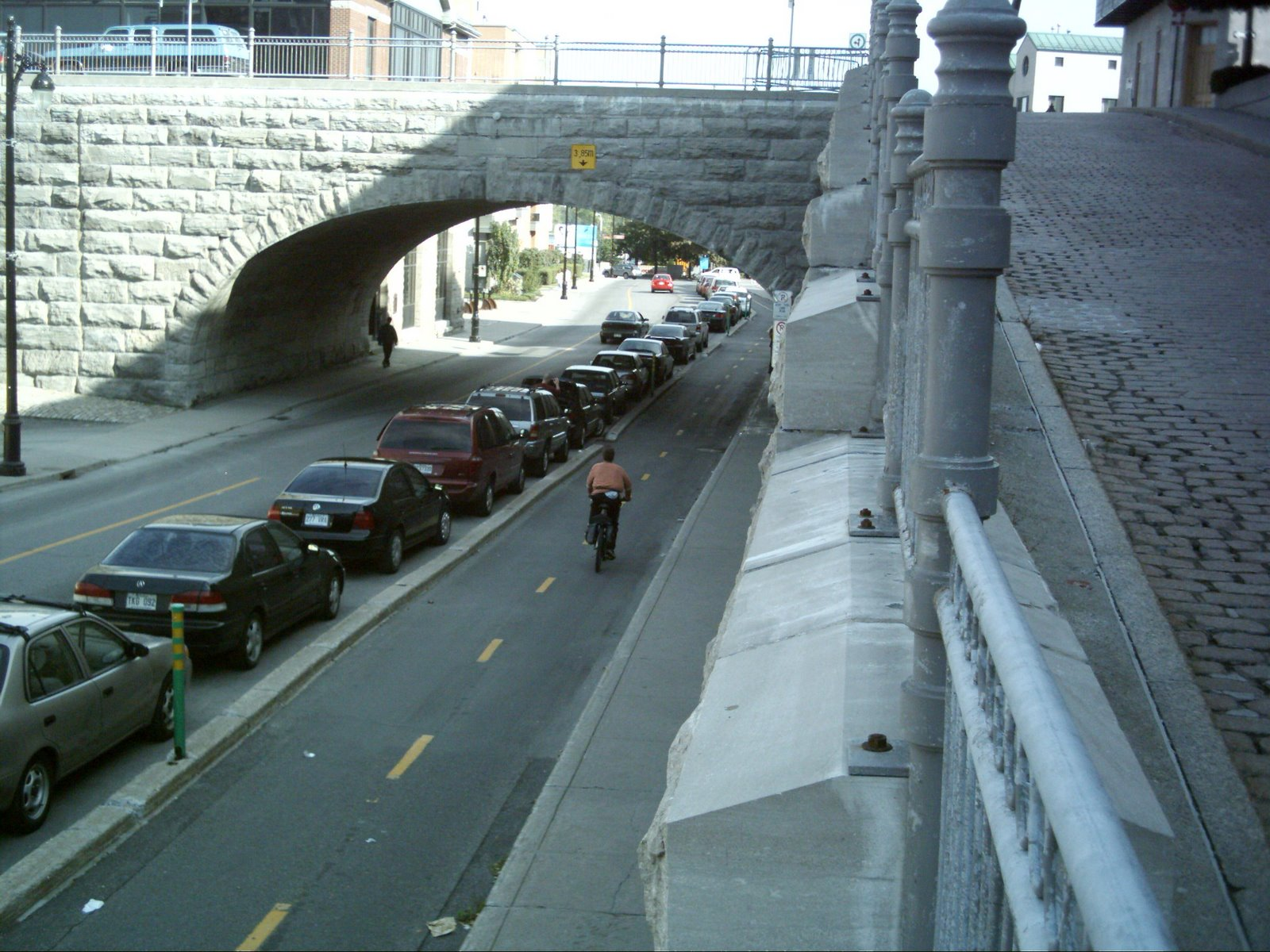 Intersection des rues Berri et Notre-Dame à Montréal. On remarque le viaduc, la desserte qui monte jusqu'à la rue Notre-Dame, la piste cyclable. Vue du nord vers le sud.